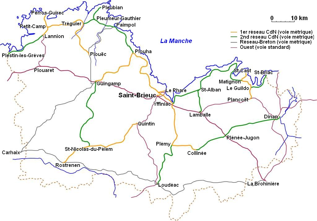 Carte du Réseau des Chemins de Fer des Côtes-du-Nord